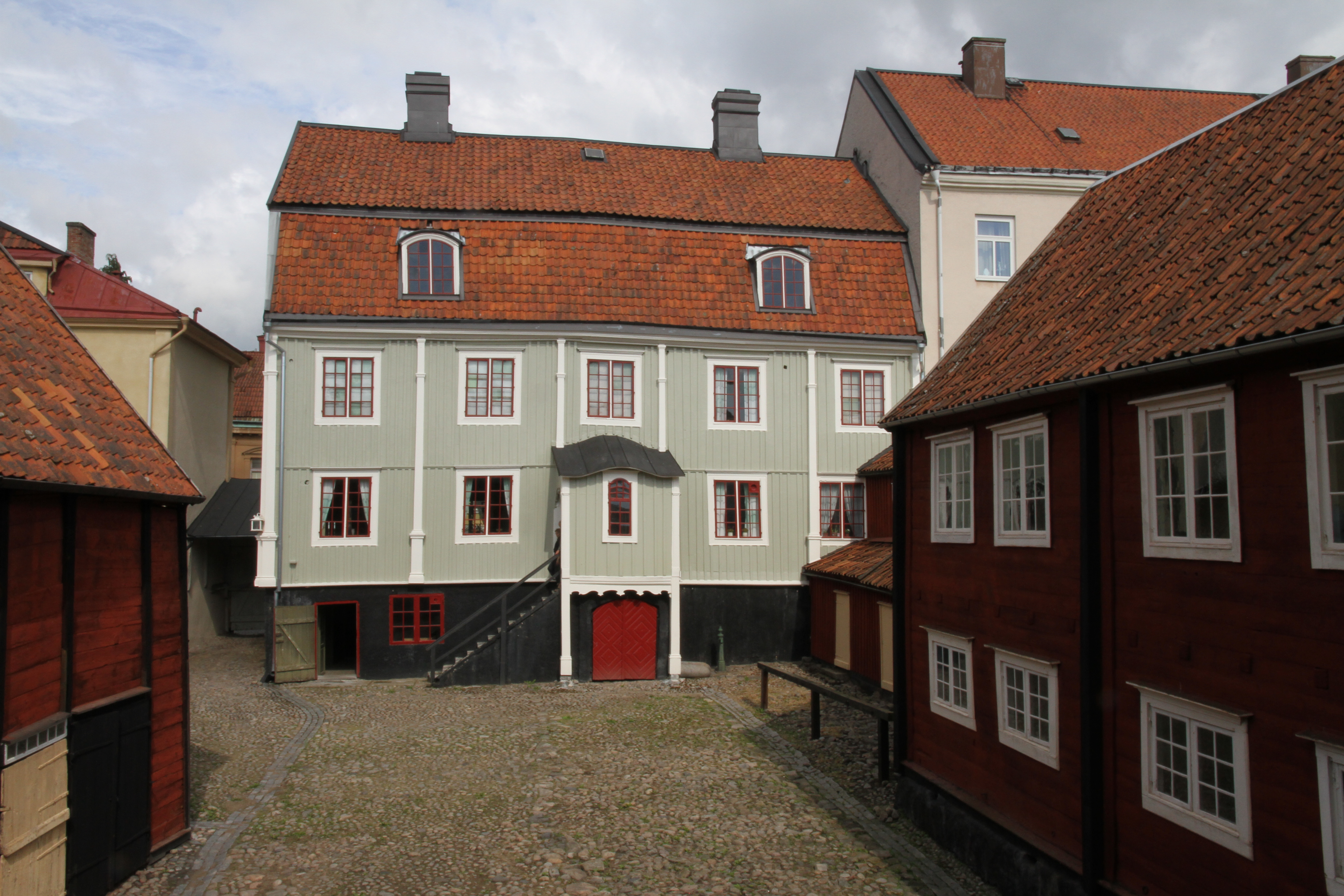 Skottbergska gården, Karlshamn 21 juli 2015